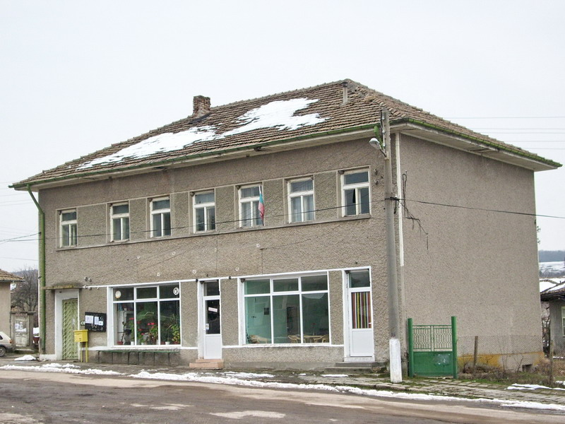 Село Глогинка, община Попово. Пощата.